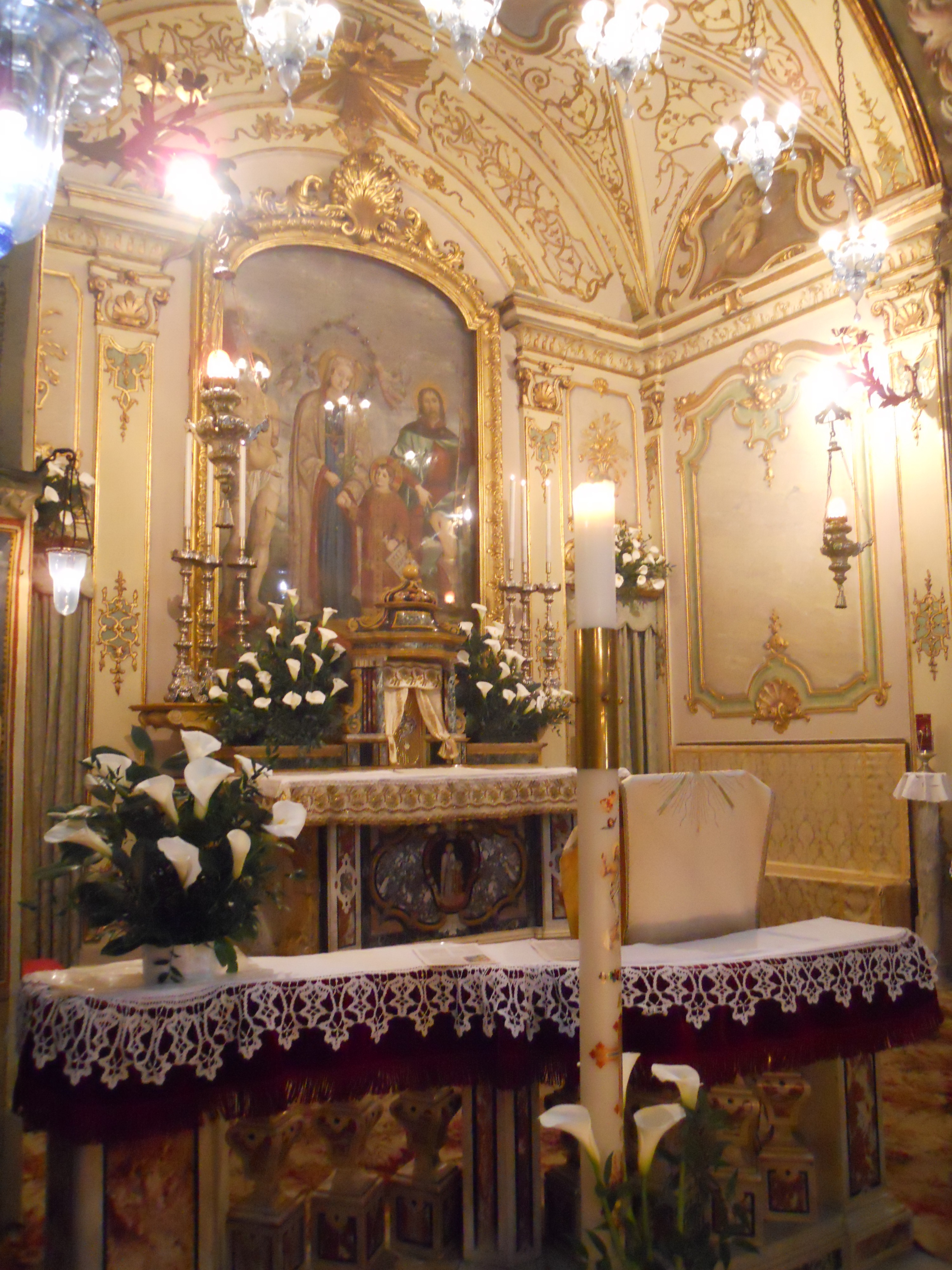 Santa maria delle consolazioni (altare maggiore).jpg